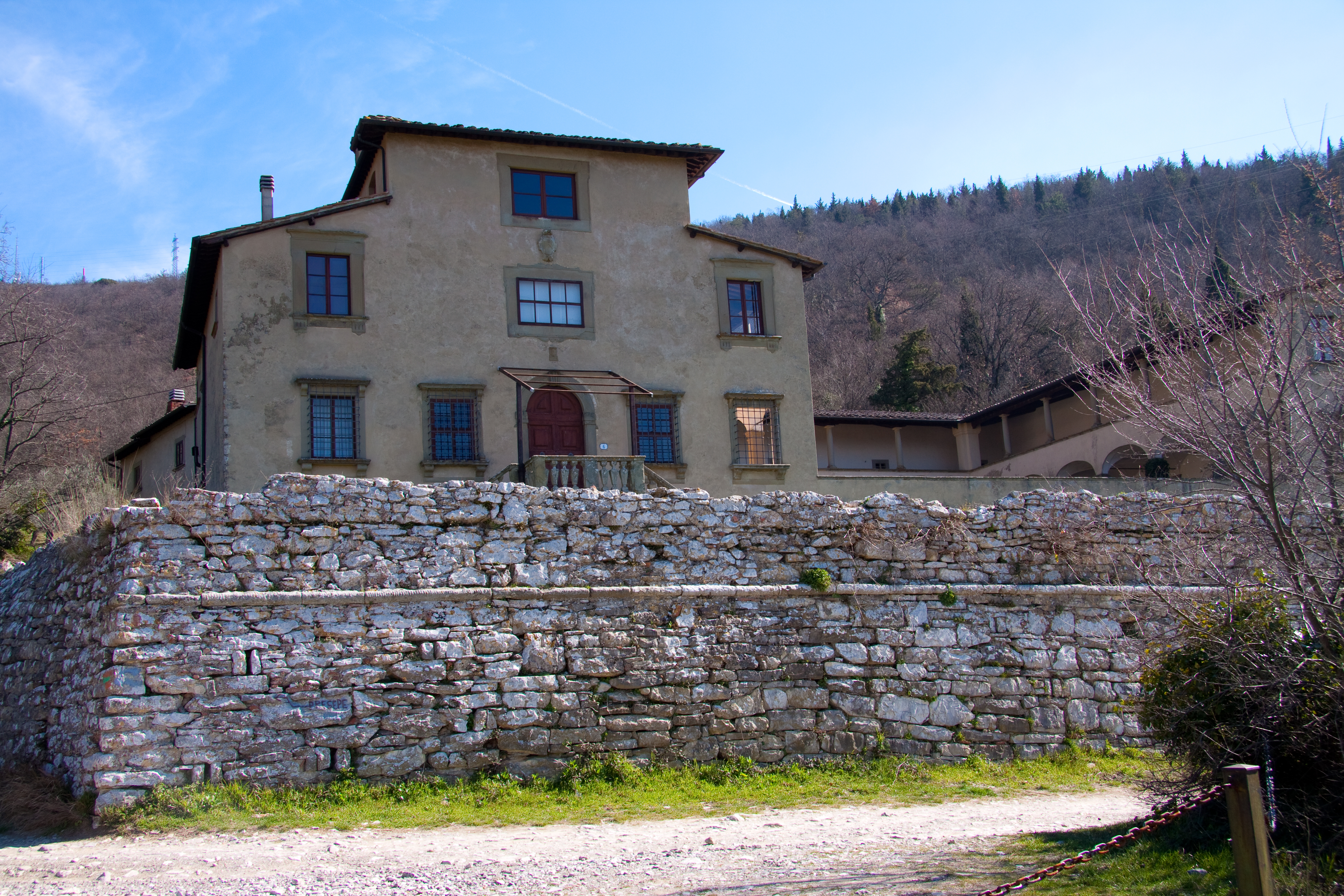 Villa e convento di Carmignanello - Sesto Fiorentino